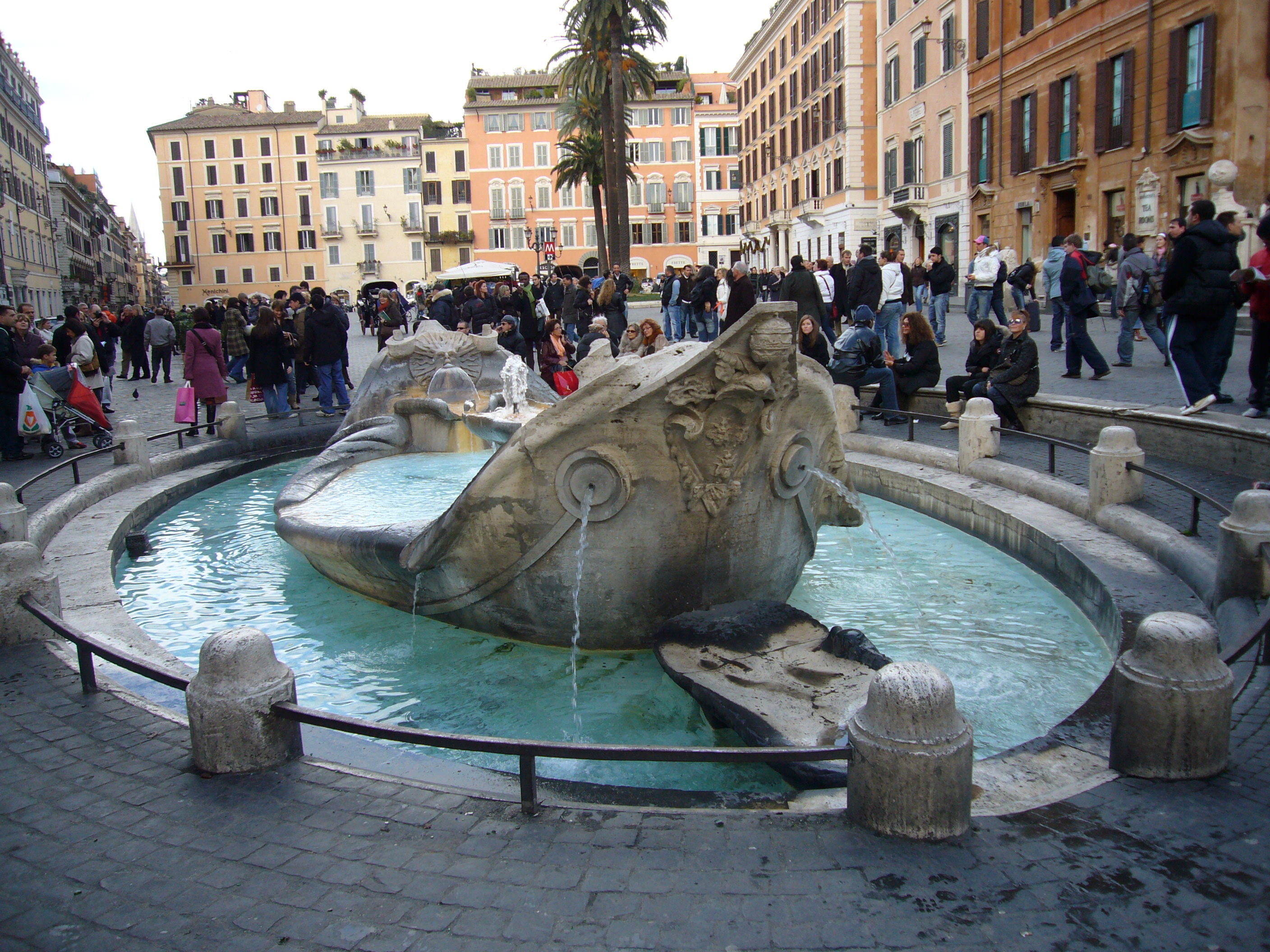 Roma, piazza di Spagna: fontana della Barcaccia